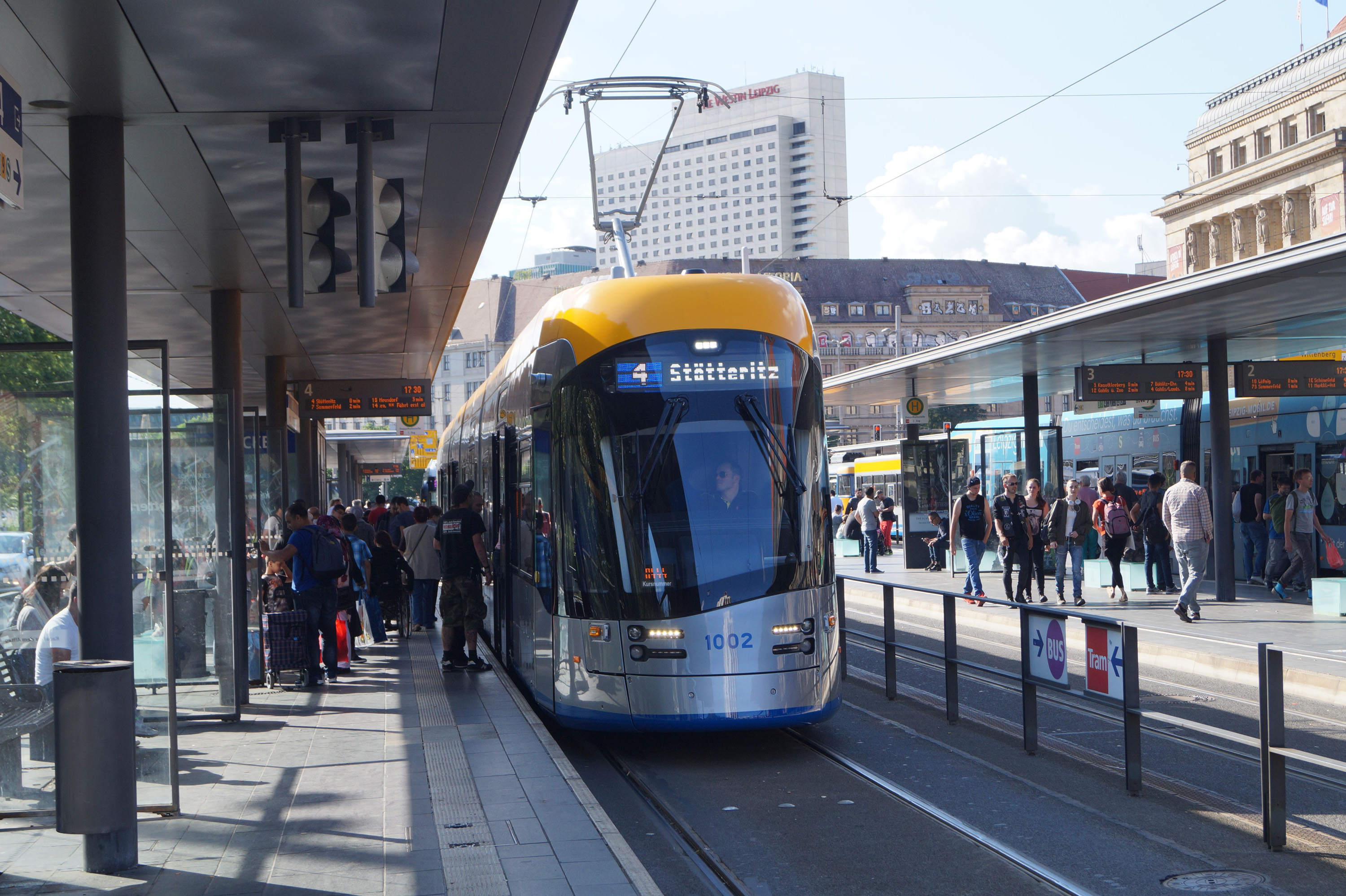 Solaris Tramino NGT10 1002 am Leipziger Hauptbahnhof